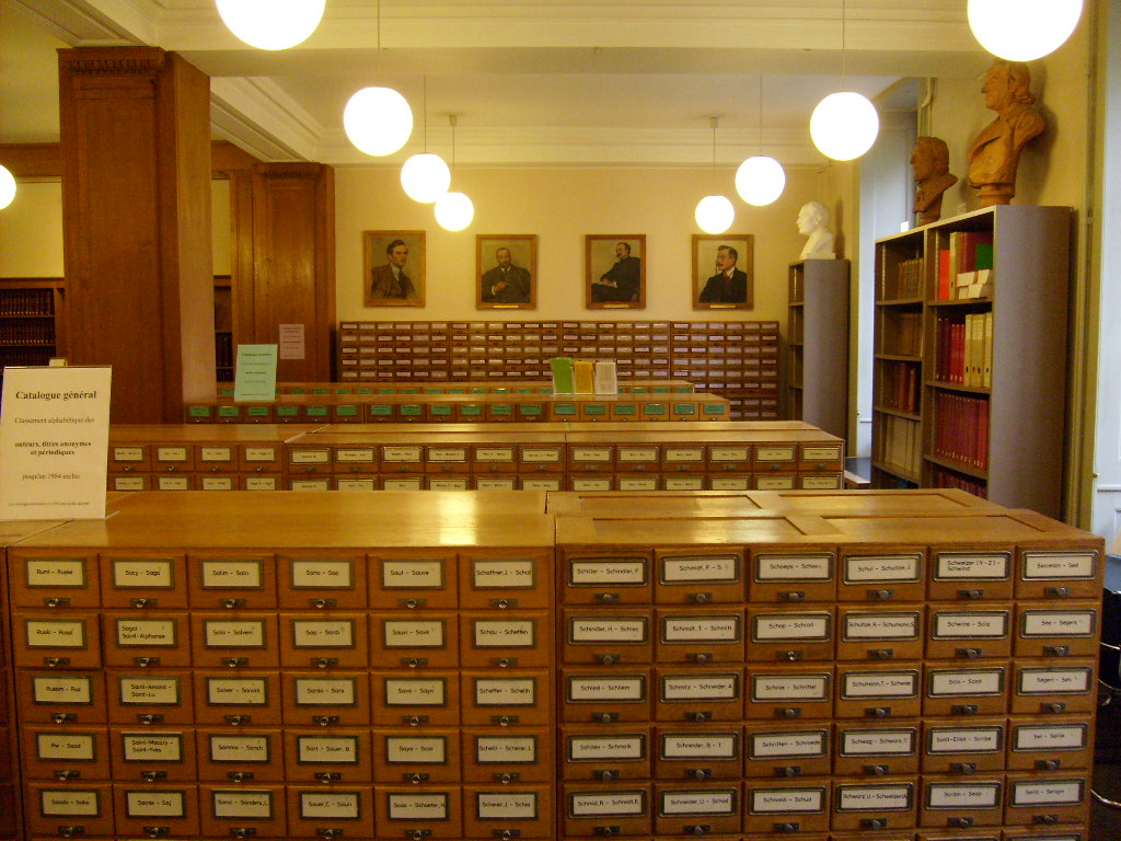 Catalogue sur fiches de la Bibliothèque de Genève (Suisse)